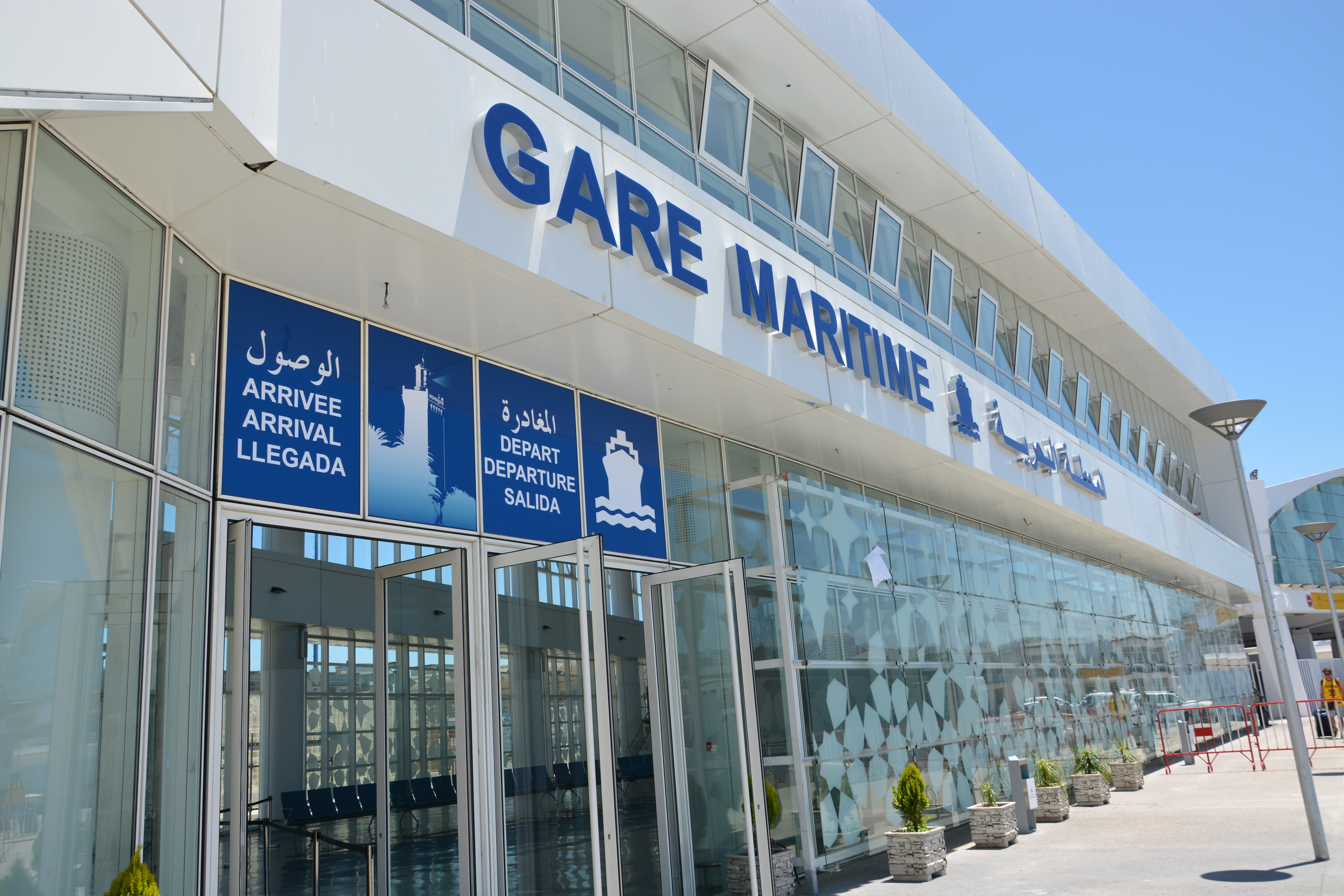 Entrée de la gare maritime du Port de Tanger Ville